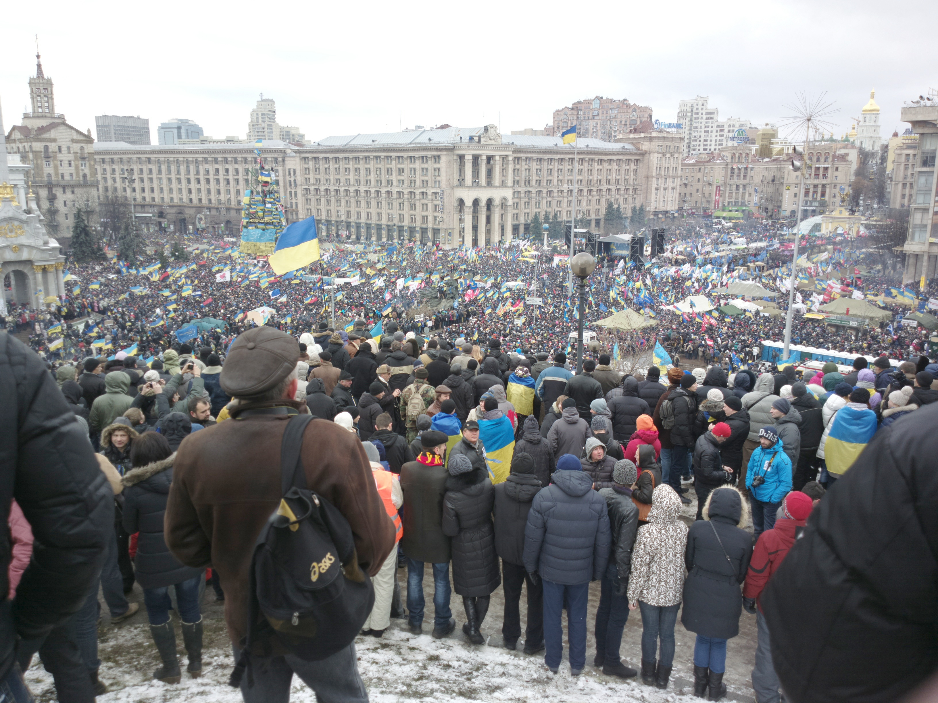 Euromaidan